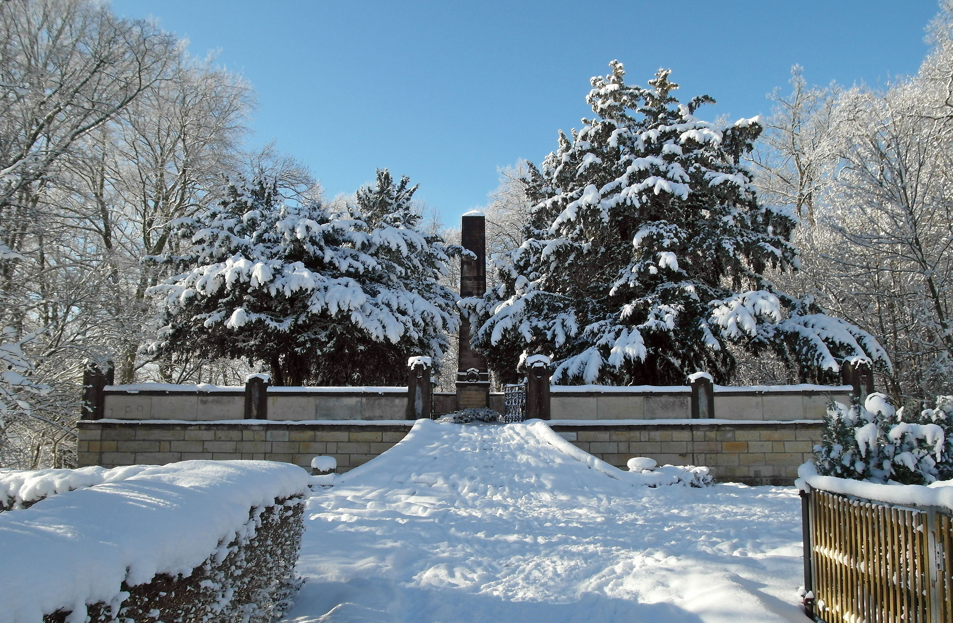 19.01.2017 01705 Kleinnaundorf (zu Freital): Am Segen, Bergmannsgrab. Obelisk auf dem Gelände des ehemaligen Segen-Gottes-Schachtes zum Gedenken an das Grubenunglück vom 2. August 1869. [SAM8193.JPG]20170119100DR.JPG(c)Blobelt